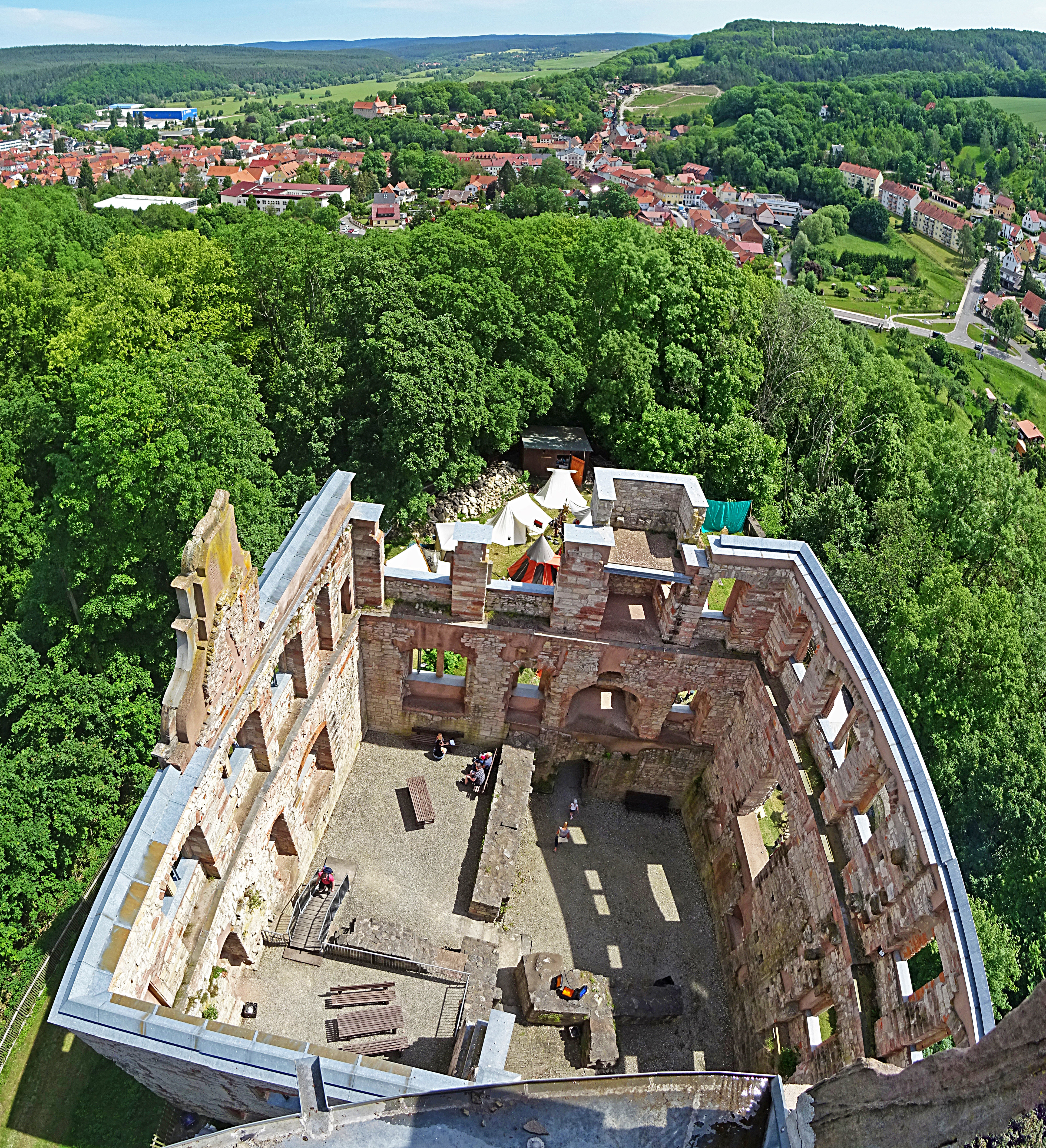 Oberschloss Kranichfeld, Blick vom Bergfried über die gesicherte Ruine der Kernburg nach Osten